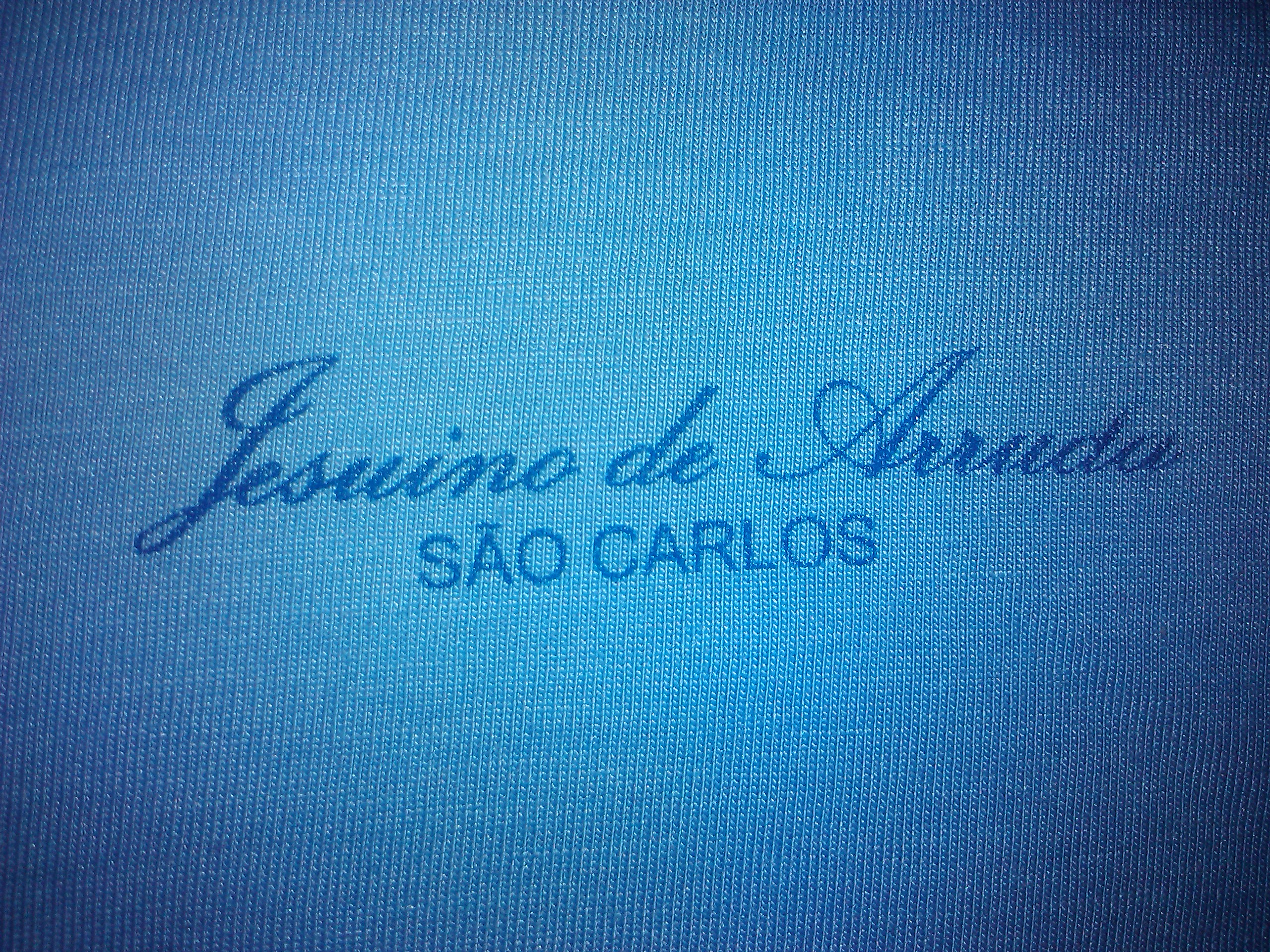 Escola Estadual Jesuino de Arruda